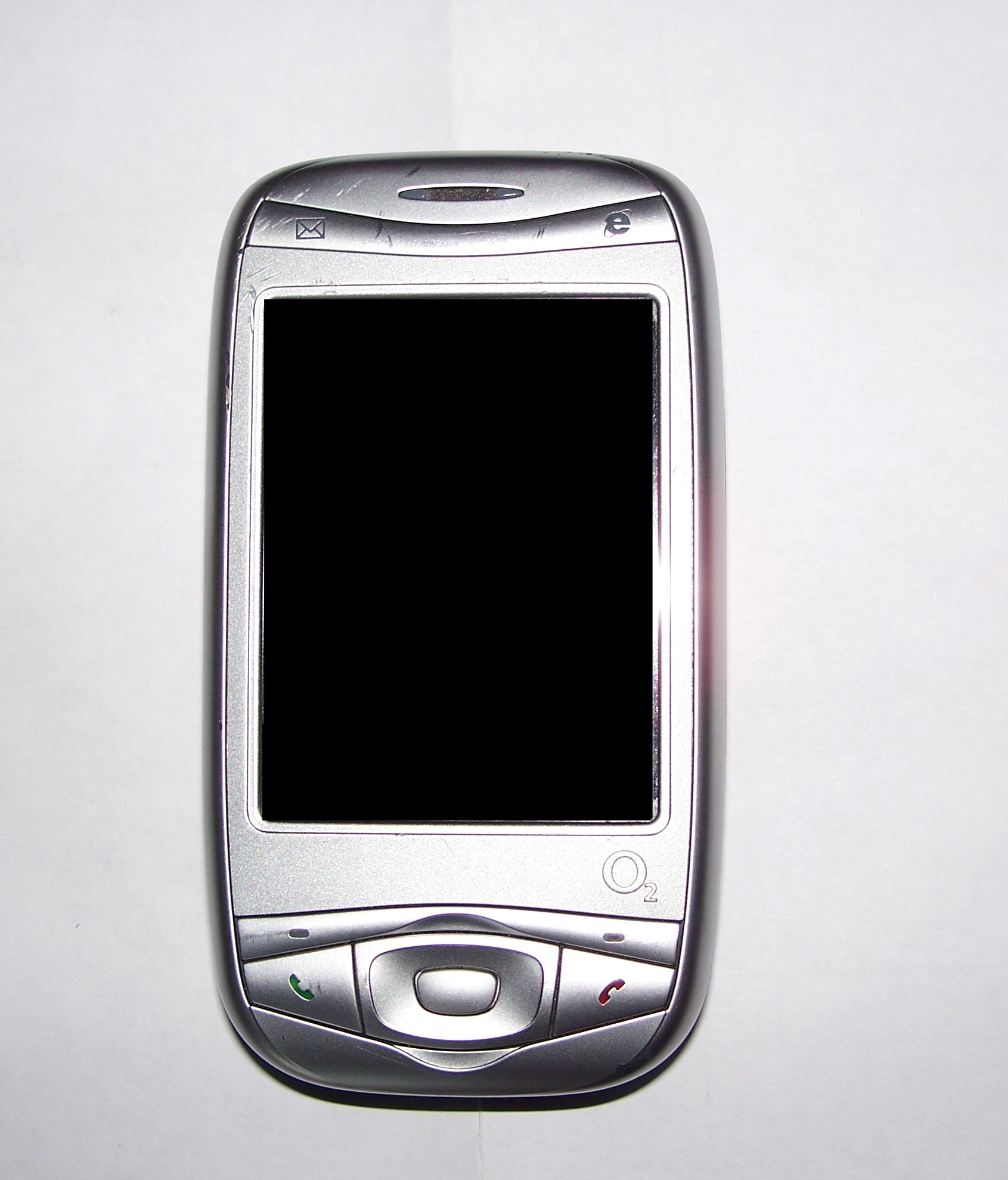 My o2 XDA Mini S